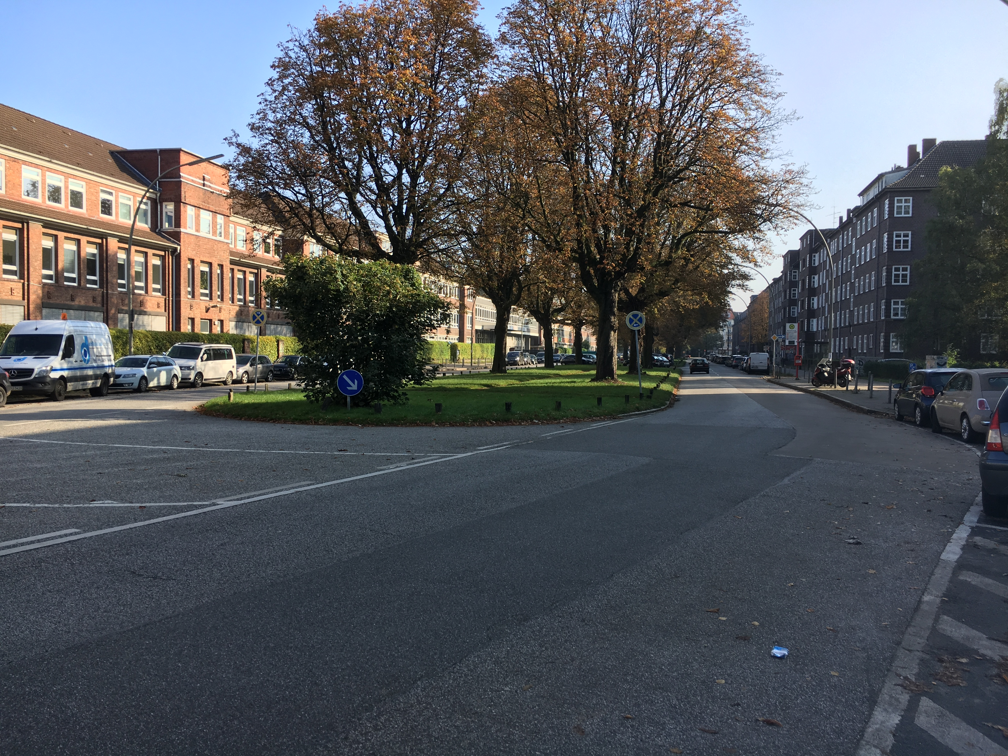 Wiesendamm, Blick von der Stichkanalbrücke in Richtung der Kreuzung Hufnerstraße